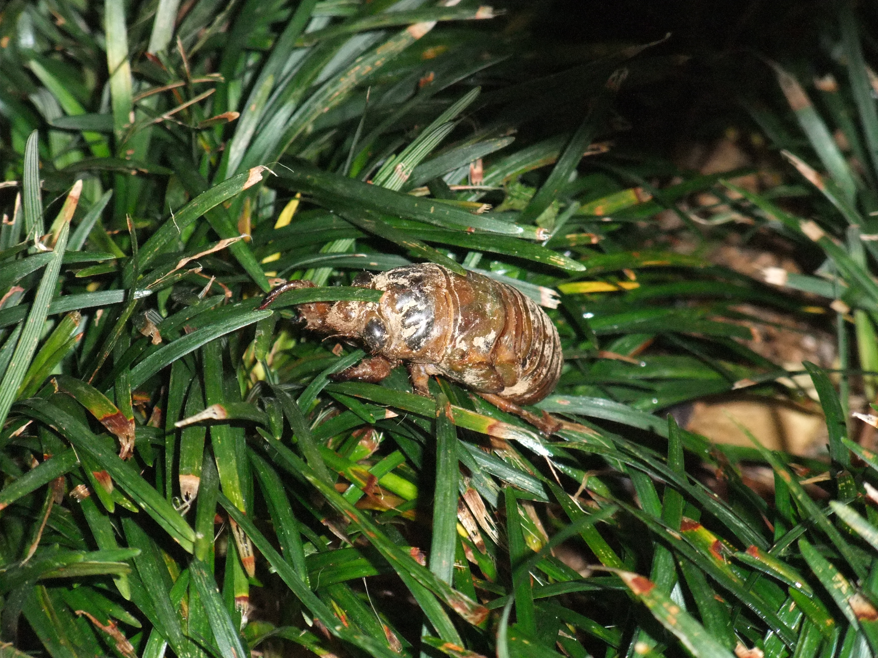 クマゼミの幼虫 (自宅庭に発生したもの)